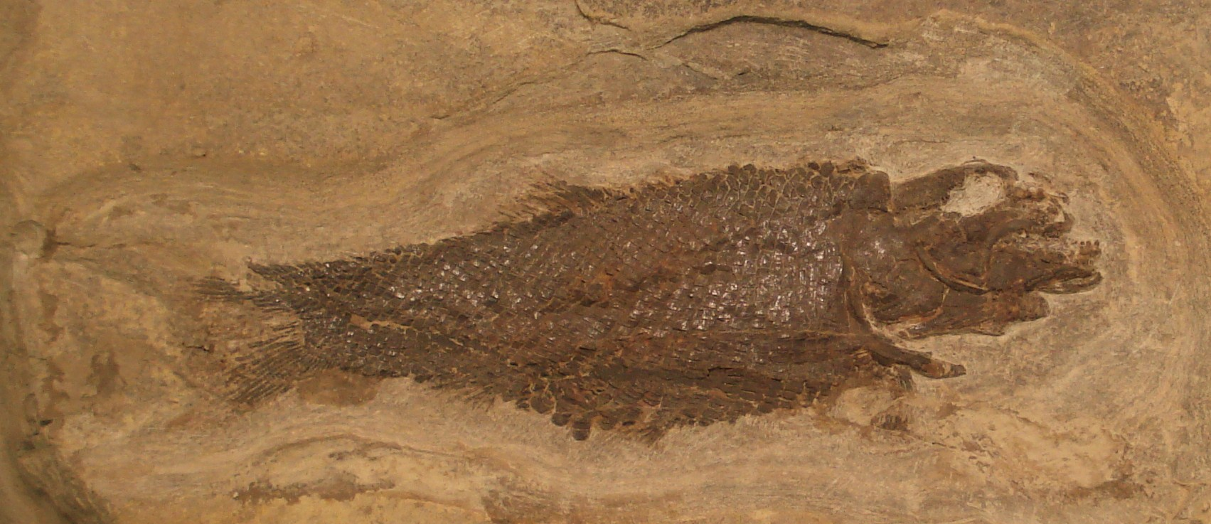 Fossil of Semionotus, an extinct fish. - Took the photo at Museo dei Fossili di Besano